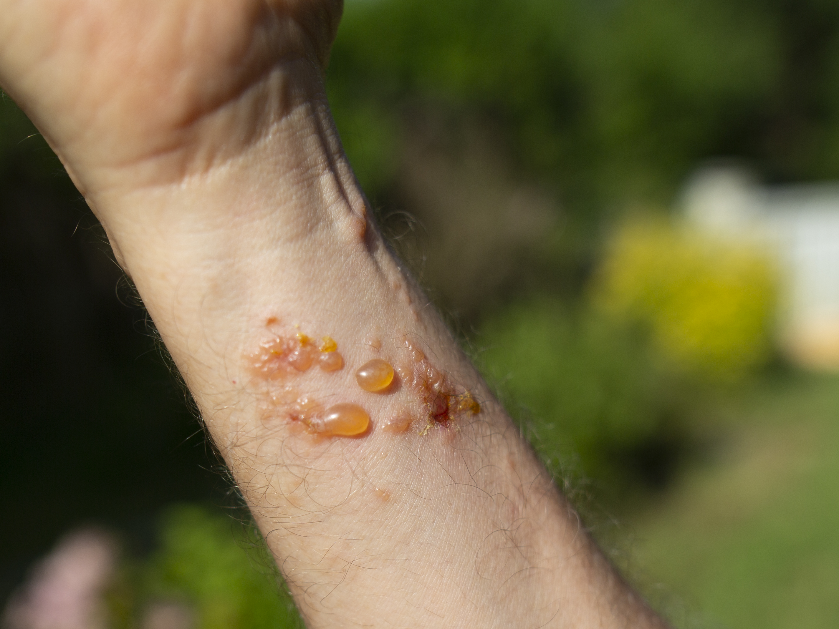 Dermite de contact